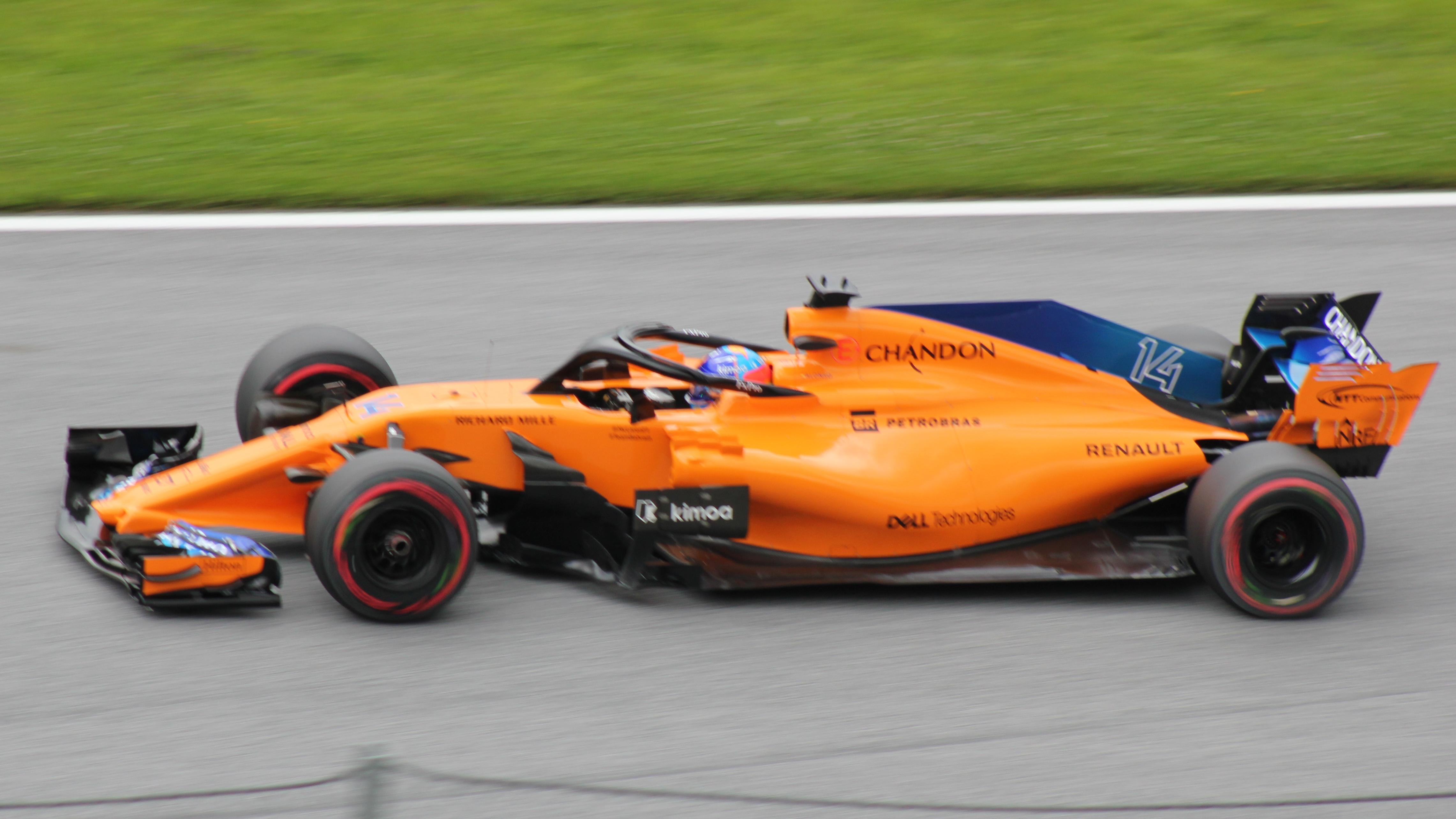 14 Alonso beim Rennwochenende in Österreich 2018